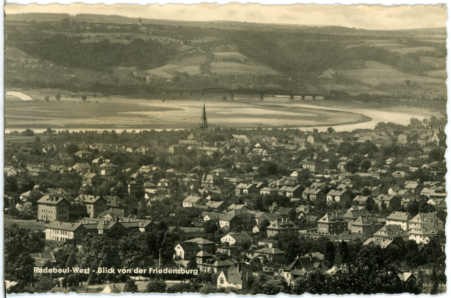 Kötzschenbroda; Blick auf Kötzschenbroda This postcard is from publisher Brück & Sohn in Meißen ( postcard has a unique number 25172 and is available in a higher resolution at the publisher. This images was uploaded in a cooperation project between Wikipedians and the publisher.